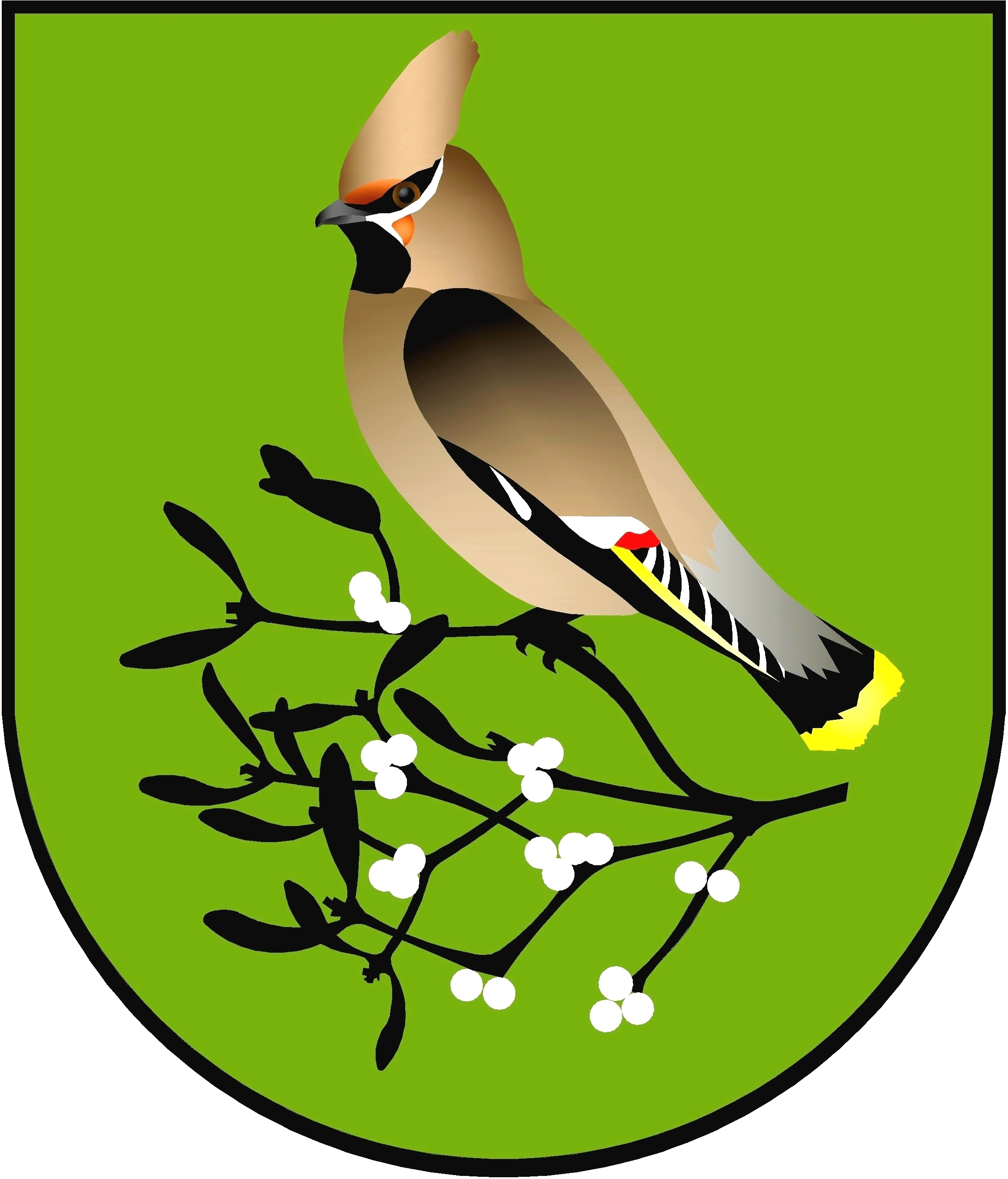 Herb Jemiołowa autorstwa Ryszardy Adamowicz